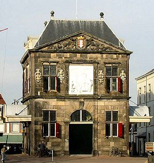 foto van Ellywa deze versie is verkleind